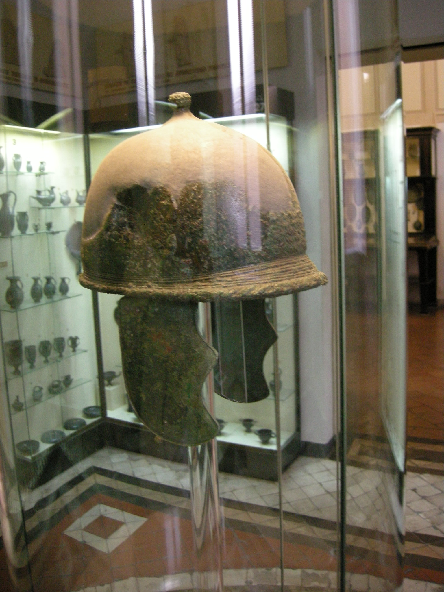 Museo guarnacci, elmo etrusco-italico a calotta con bottone centrale, paranuca e paraguance liscio iv-iii sec. ac